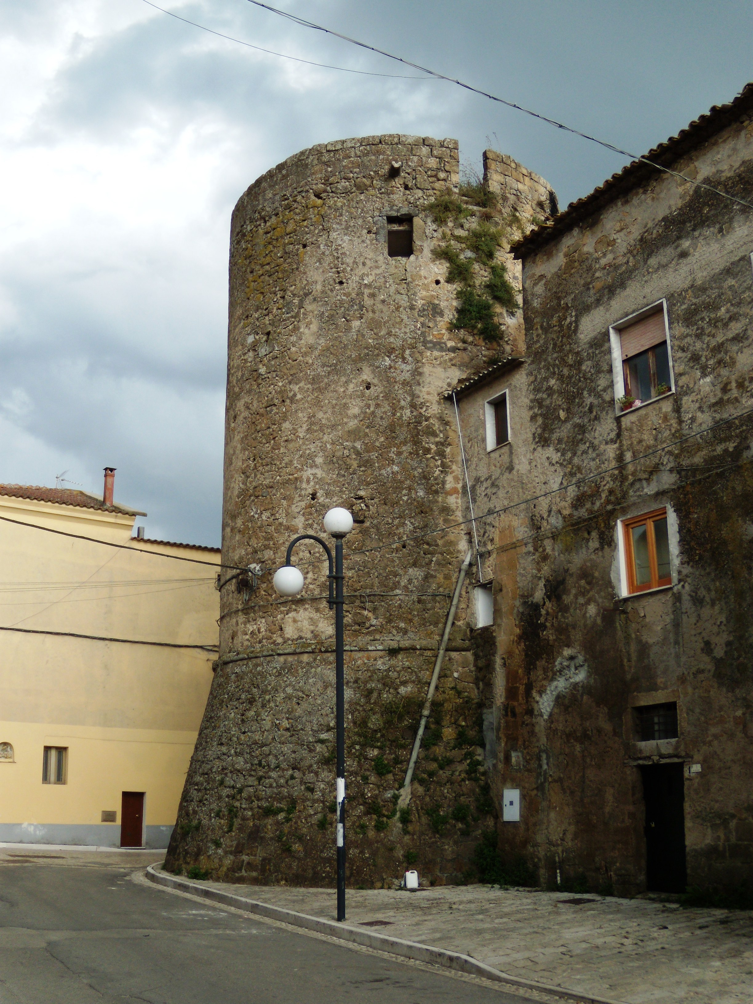 Particolare del Castello Baronale di Puglianello (Italia).